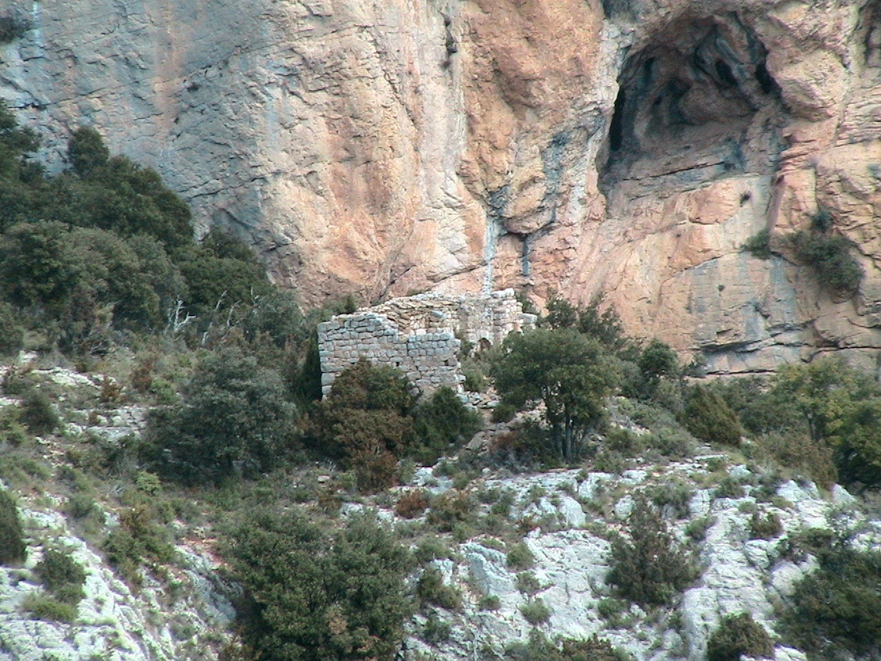 Les restes de l'ermita de Sant Serni de Fabrregada, a l'est del municipi de Vilanova de Meià, a la muntanya lo Pelat.